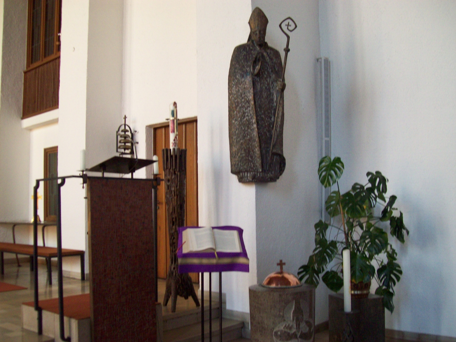 St. Kilian Aschaffenburg-Nilkheim - Ambo, Taufbecken